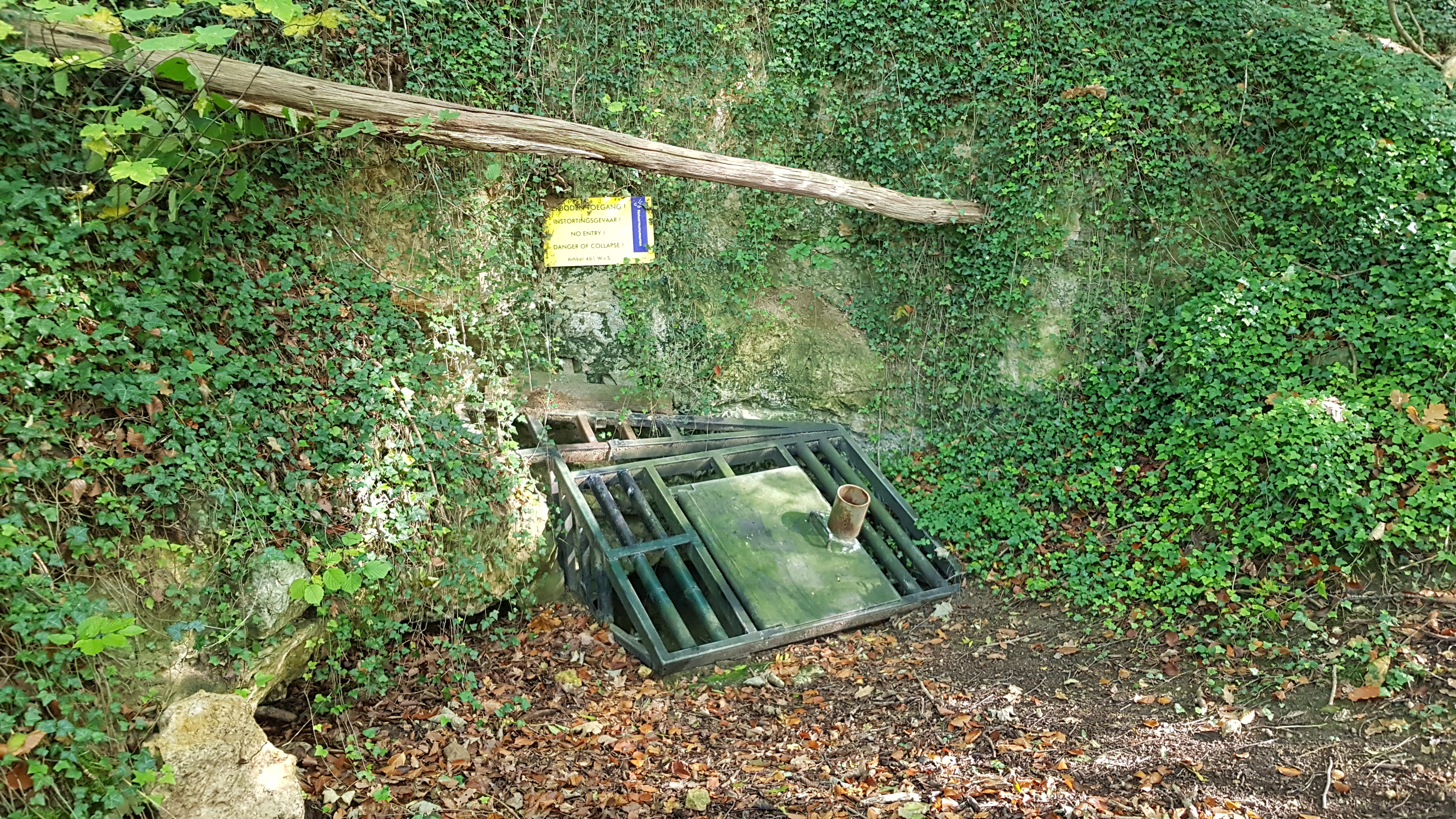 Vallenberggroeve (Biebosch), Valkenburg, Nederland